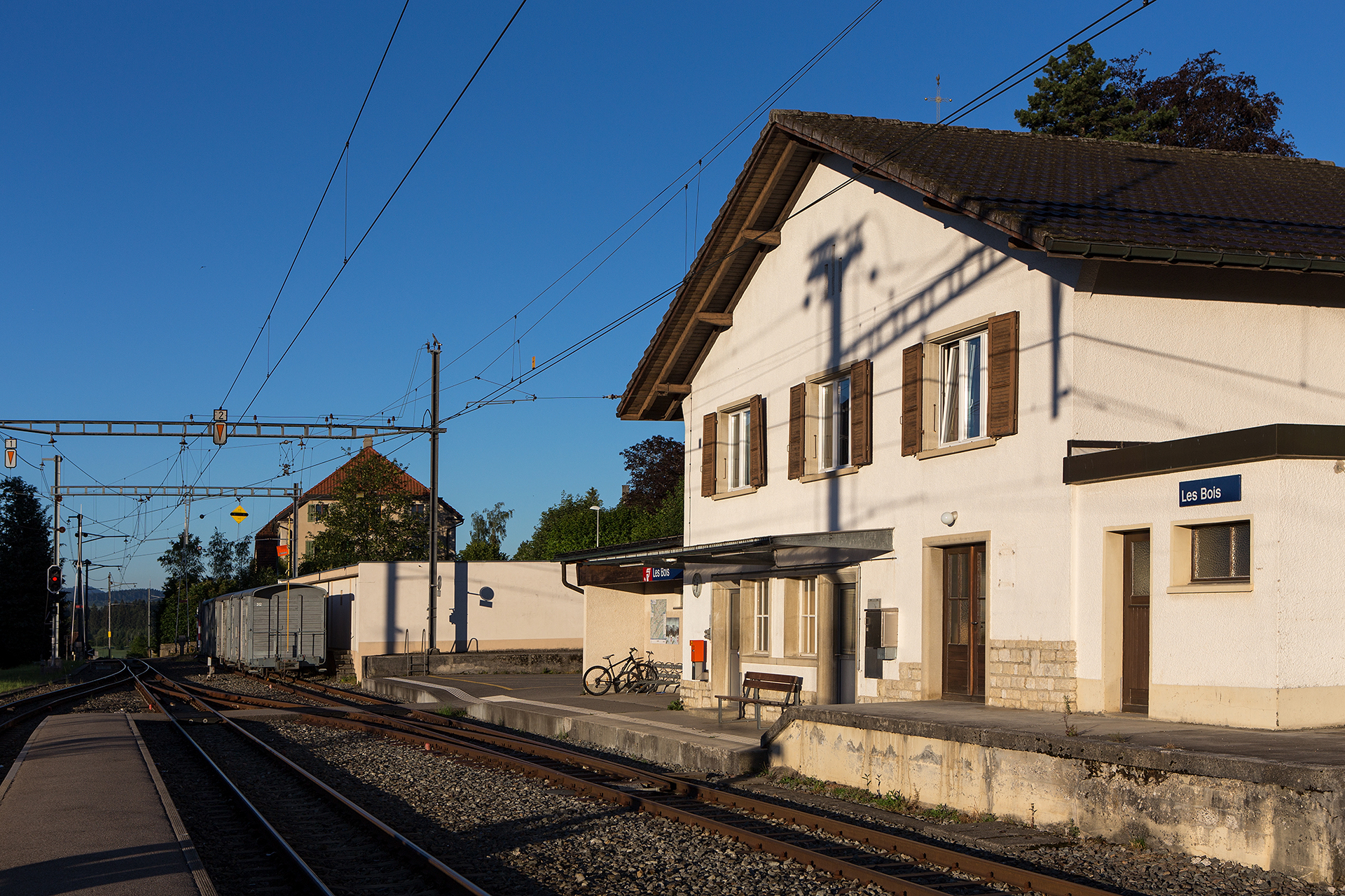 Bahnhof von Les Bois (Freiberge, JU)